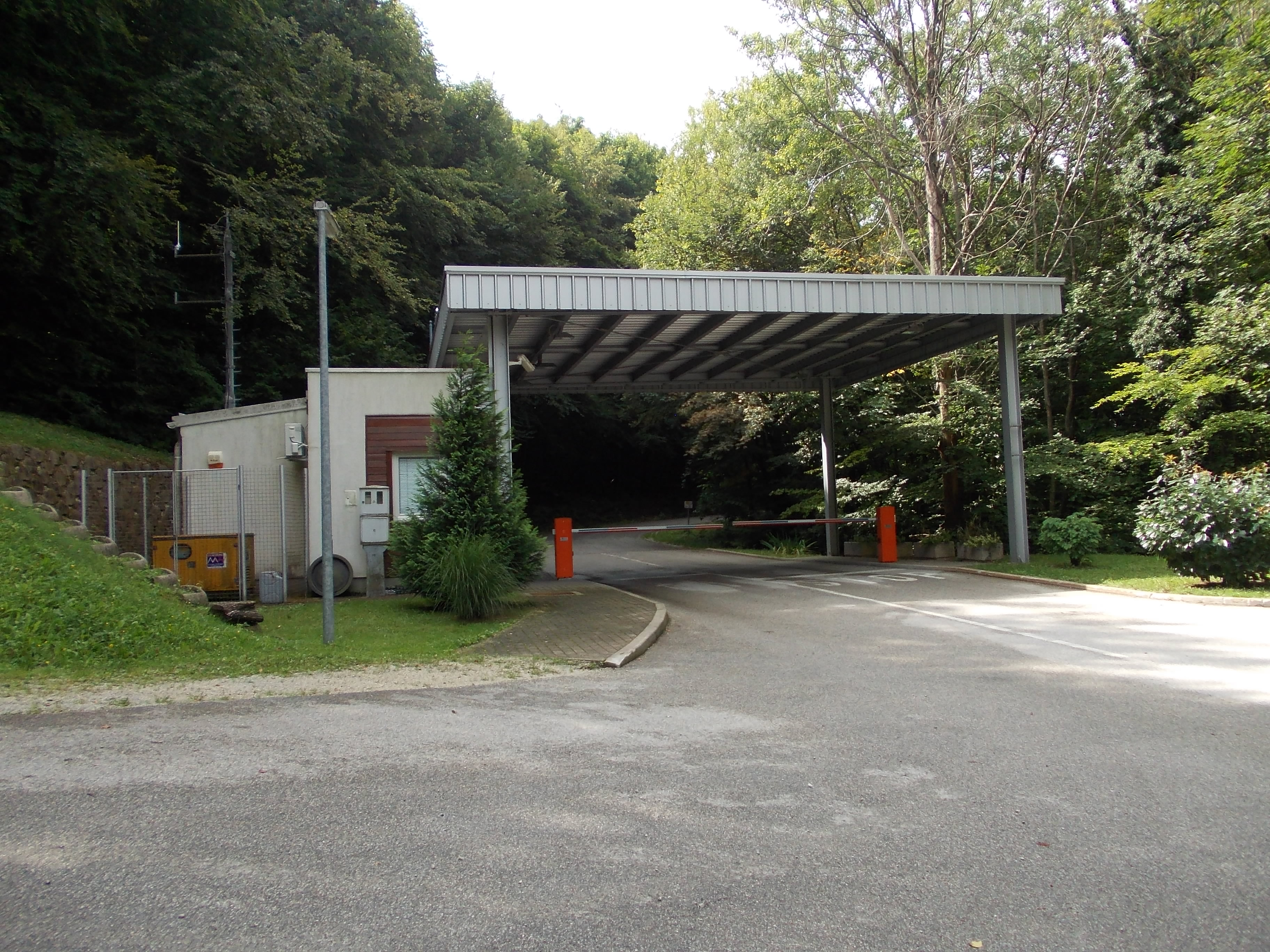 Partisan commemoration 2018 in Planina v Podbočju